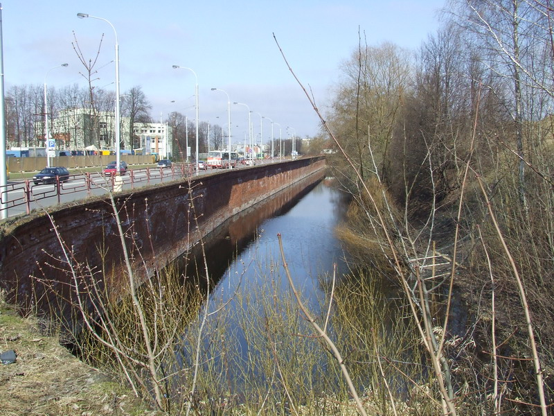 VII Kauno forto riba su Sukilėlių prospektu.